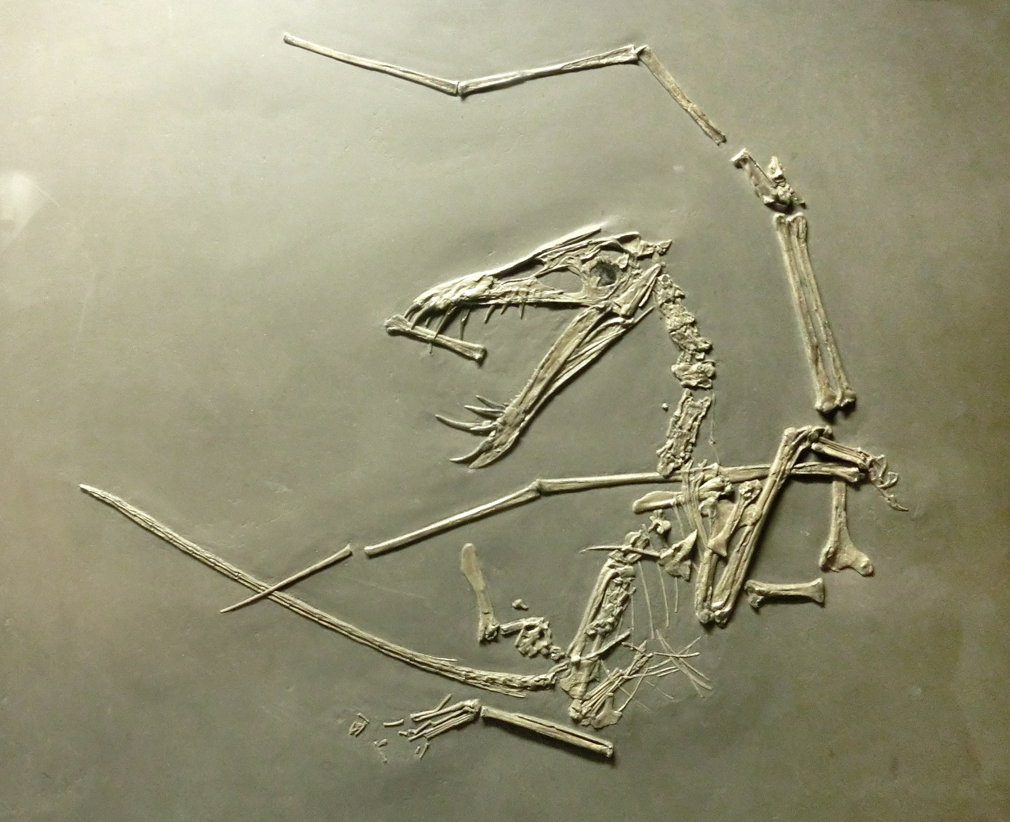 Avgjutning av flygödlan Dorygnathus banthensis på Göteborgs Naturhistoriska museum, Göteborg, Västra Götaland, Sverige. Foto och bildbearbetning av Gunnar Creutz.